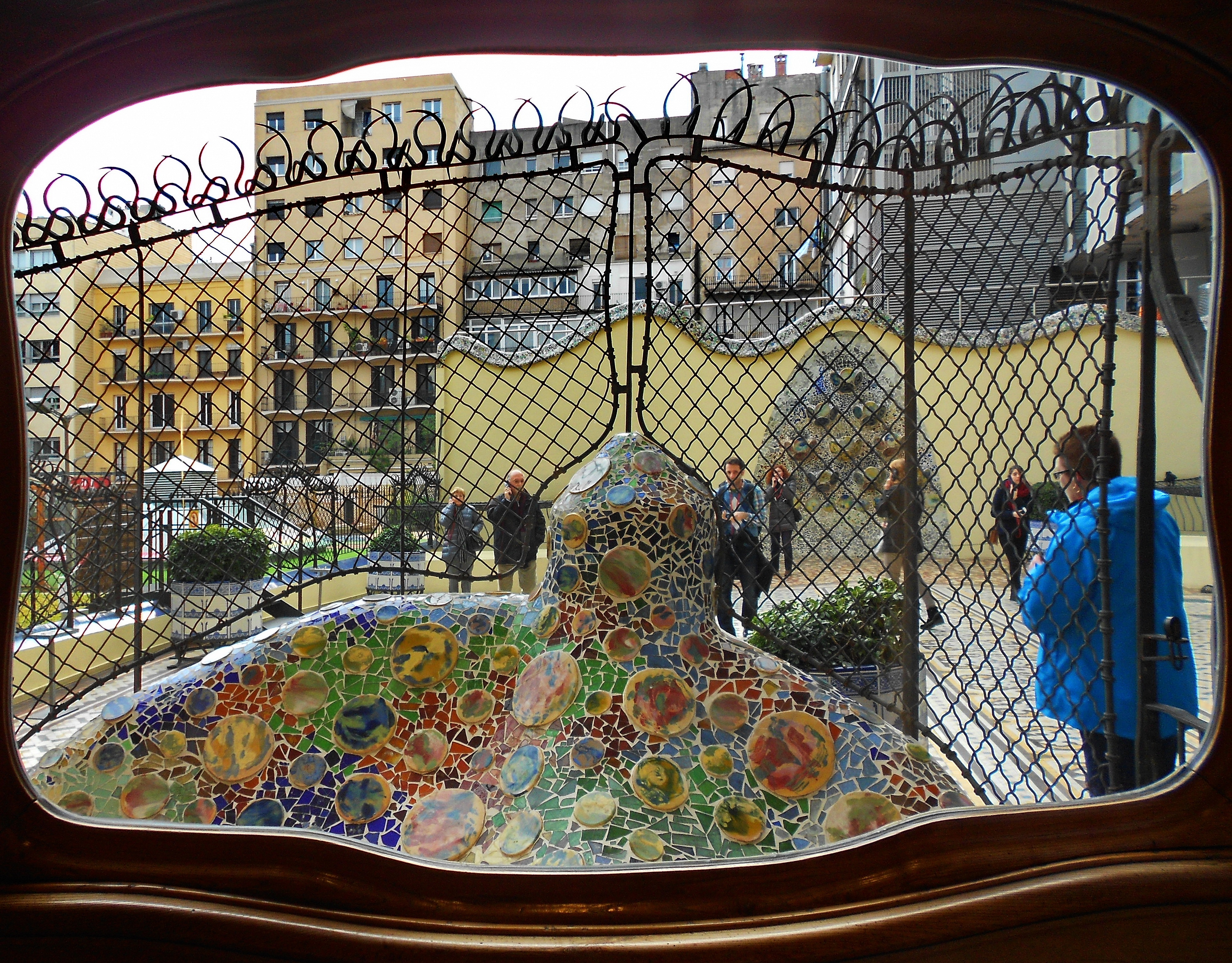 decoraciones en la terraza de la Casa Batllò